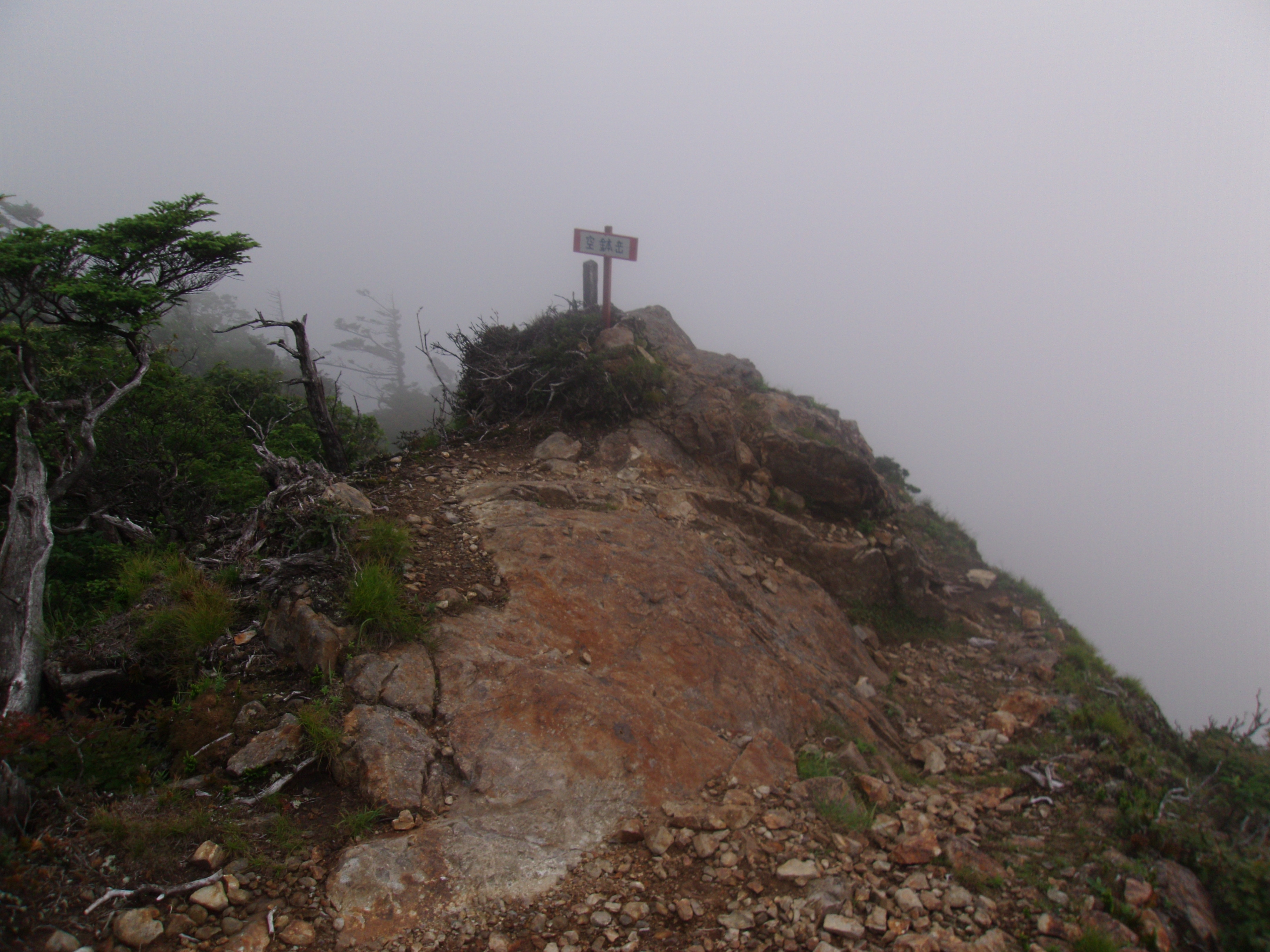 大峯奥駈道第41靡「空鉢岳」